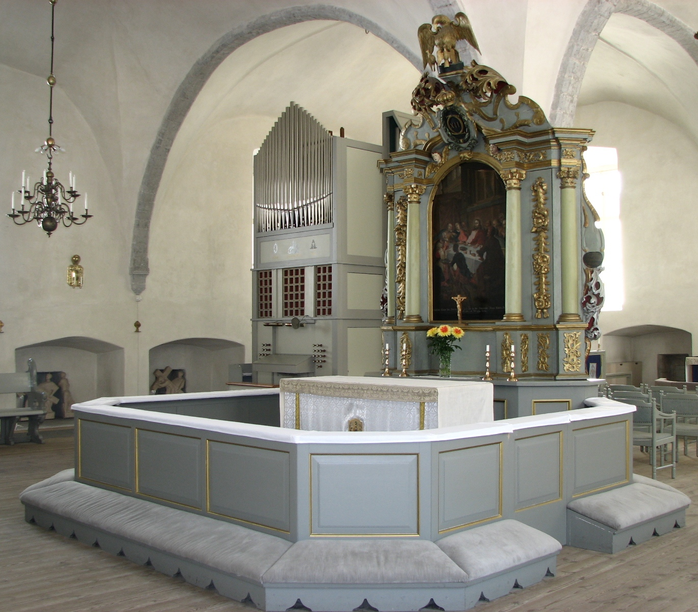 Altar Rootsi-Mihkli kirikus Tallinnas